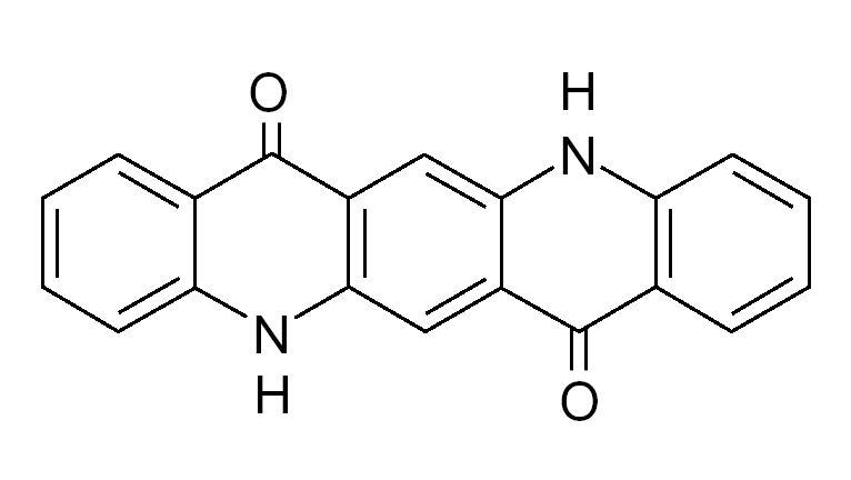 Structuur pigment quinacridone, eigen tekening, naar andere afbeeldingen op Internet